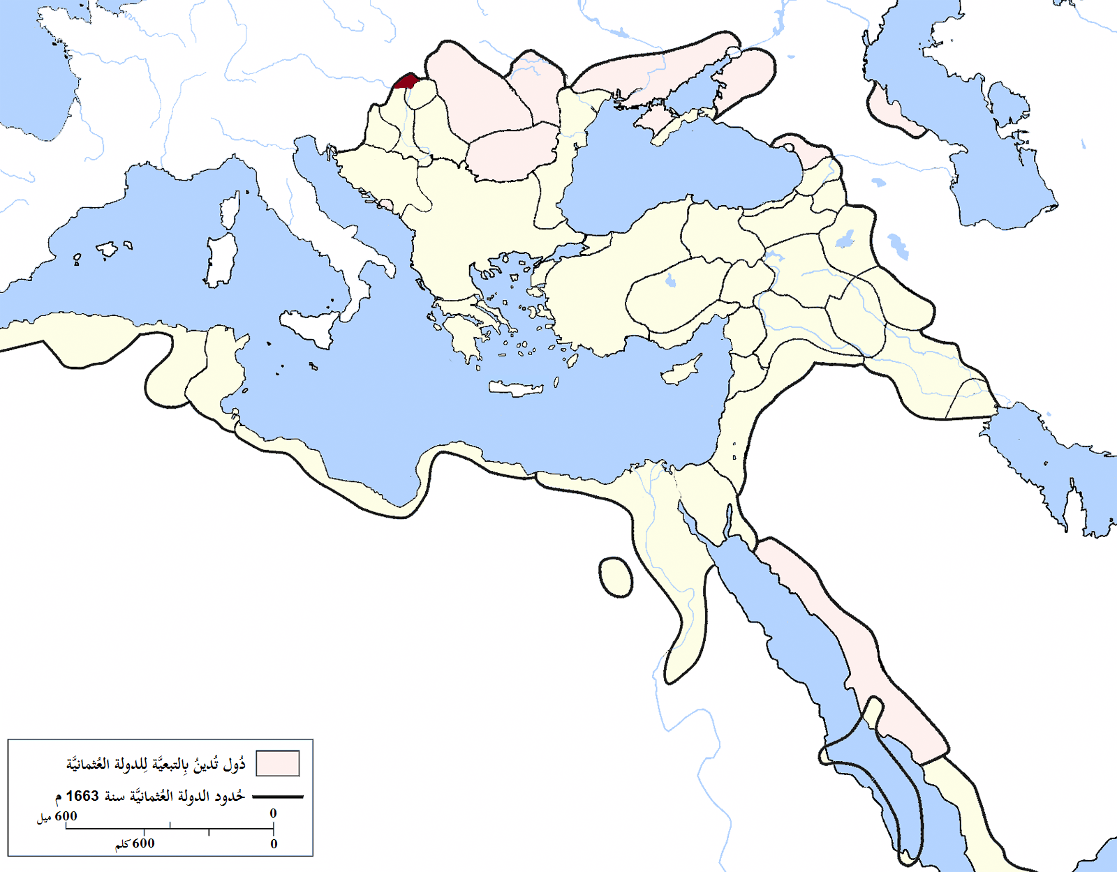 خريطة إيالة أویوار بِالدولة العُثمانيَّة سنة 1663م.